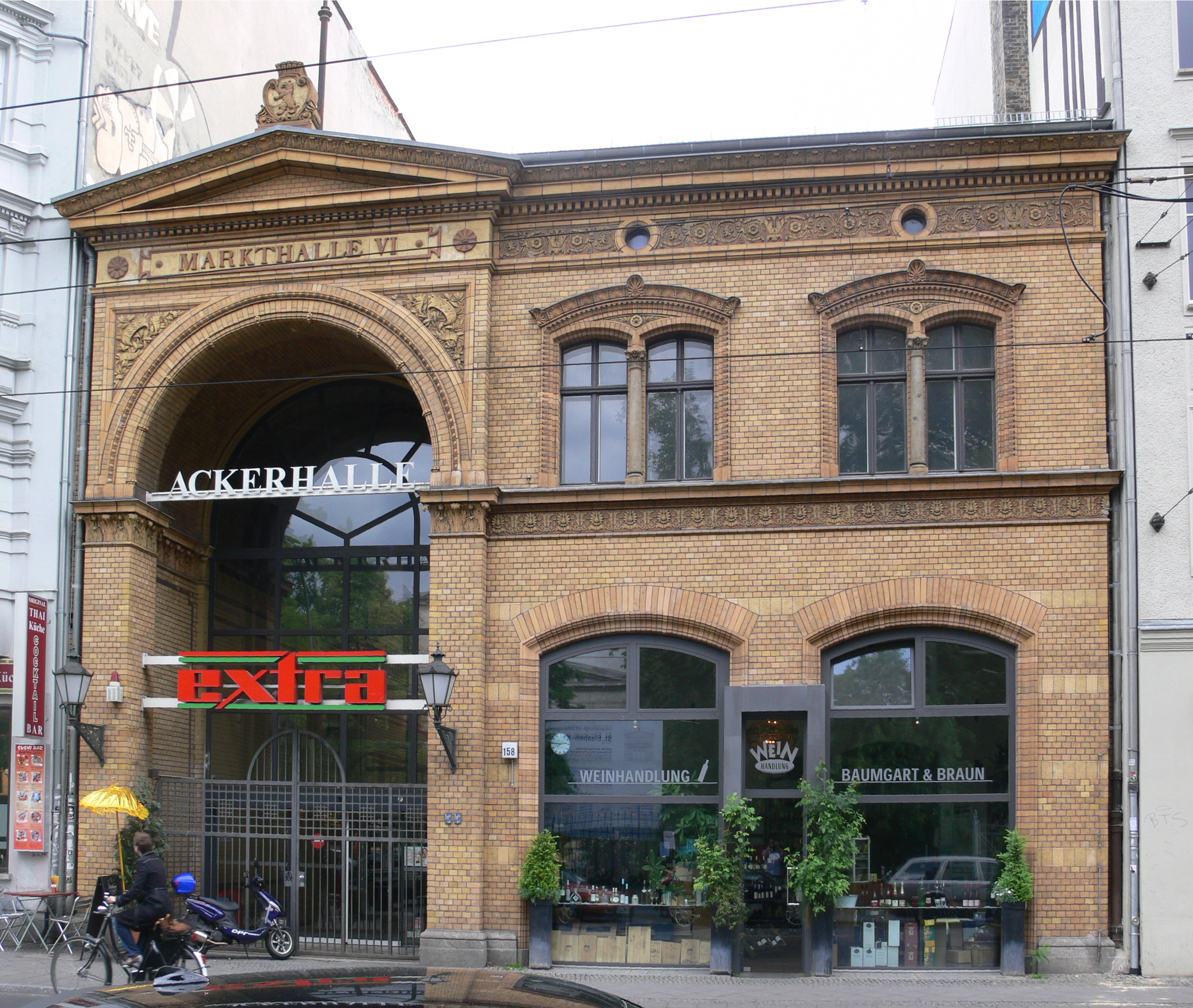 Markthalle VI (Ackerhalle), Ackerstraße/Invalidenstraße, Berlin-Mitte Fassade zur Invalidenstraße